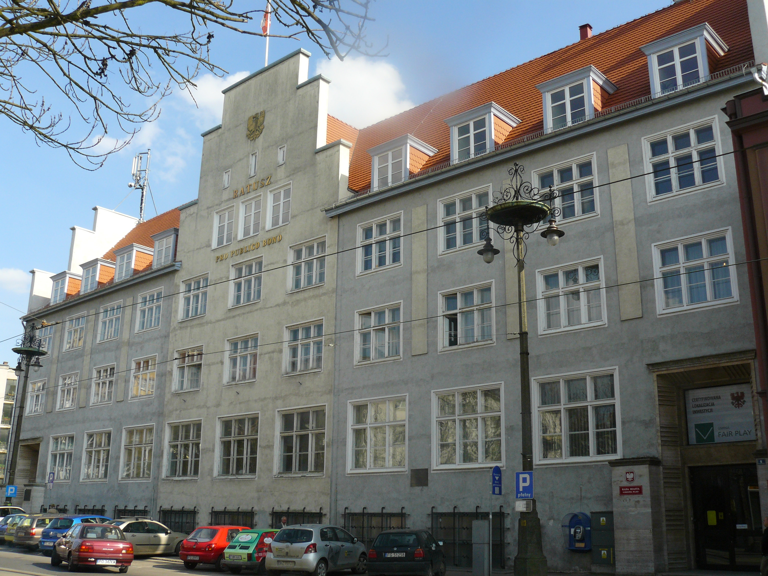 Gorzów Wielkopolski, ul. gen. Władysława Sikorskiego 3-4 - ratusz (Urząd Miasta).